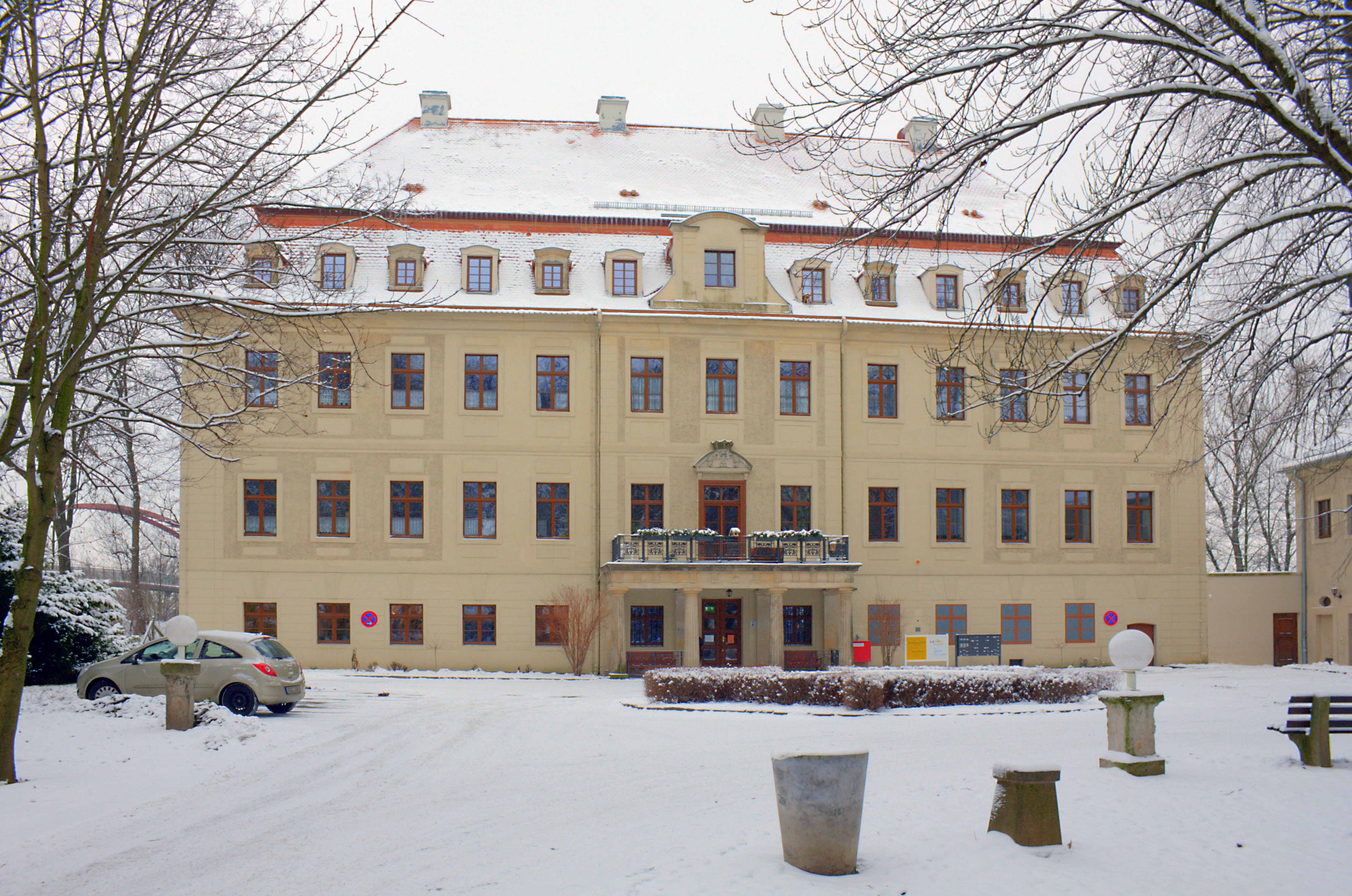 Schloss Gröba Kirchstraße 46 in Riesa